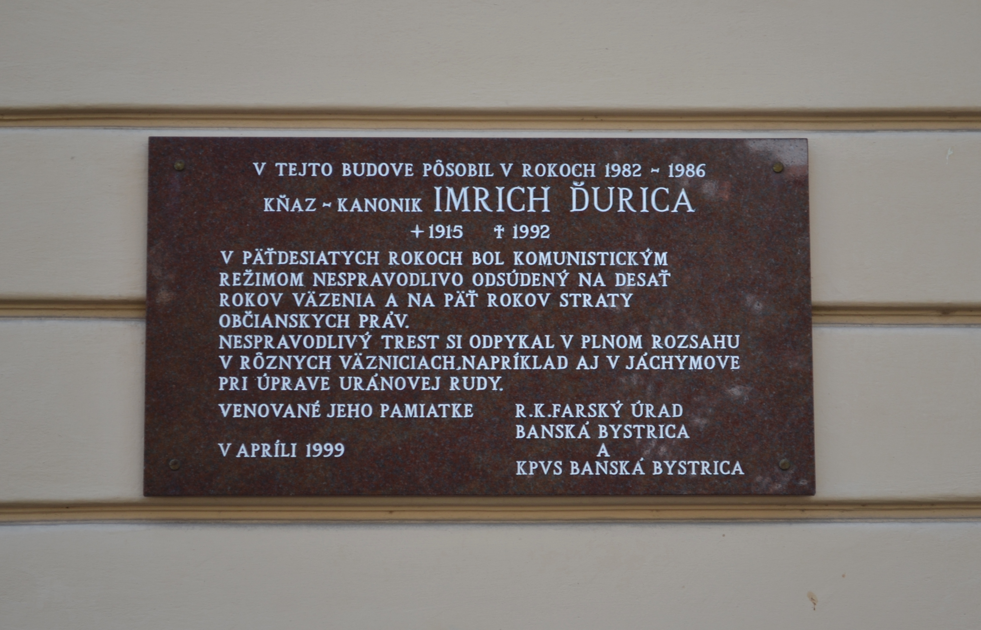 Pamätná tabuľa na budove rímskokatolíckeho farského úradu venovaná na pamiatku Imricha Ďuricu, Námestie Š. Moyzesa 1